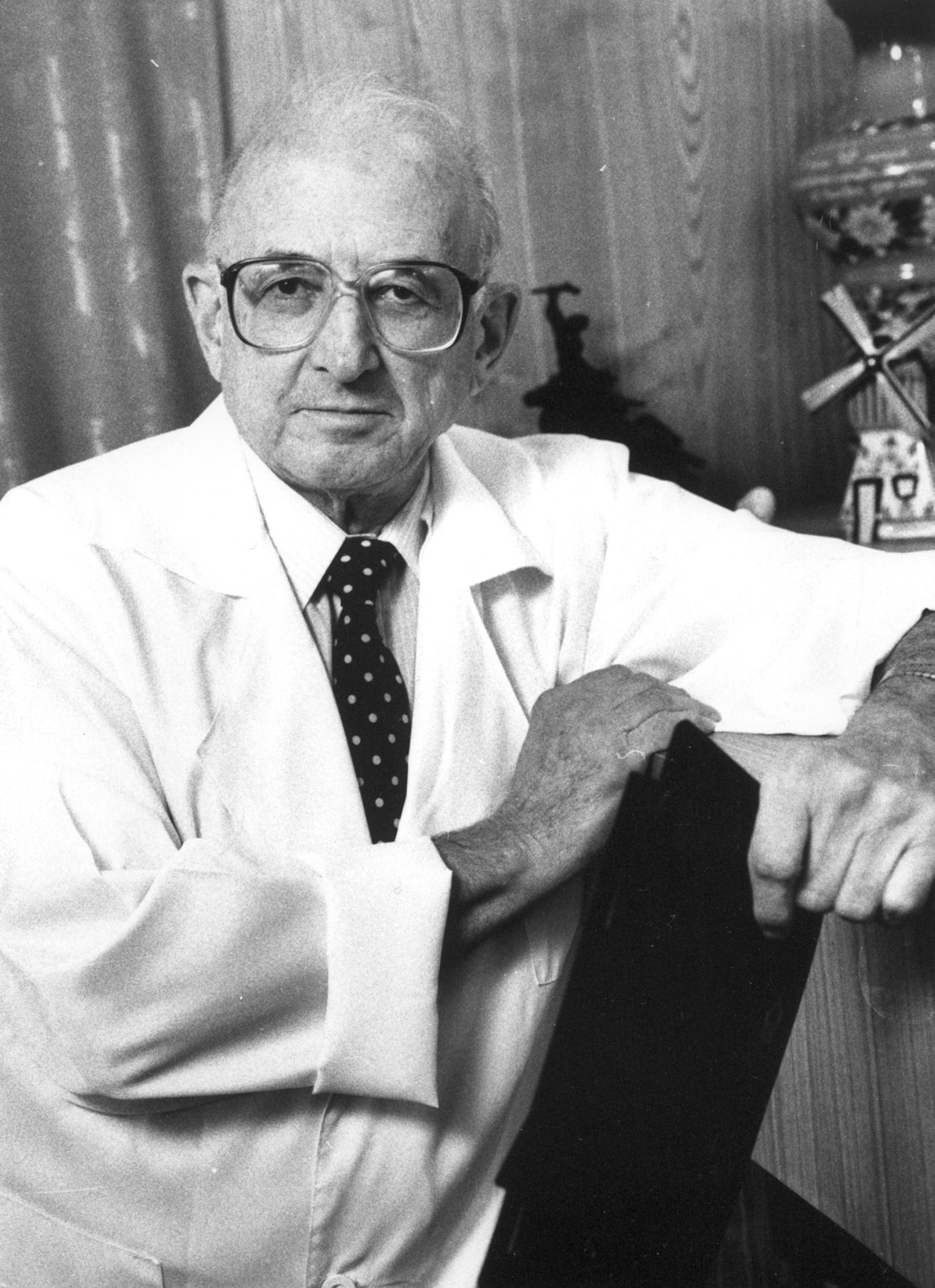 Михаил Израилевич Перельман — доктор медицинских наук, профессор, академик РАМН, президент Российского общества фтизиатров.